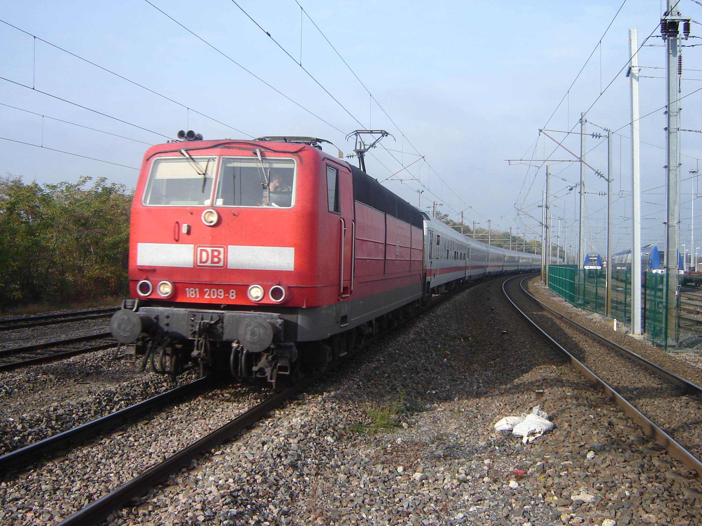 BR 181 en Gare de Krimmeri-Meinau, lors de la fermeture de la gare de Strasbourg pour la mise en service du Poste d'Aiguillages Informatisé (PAI)